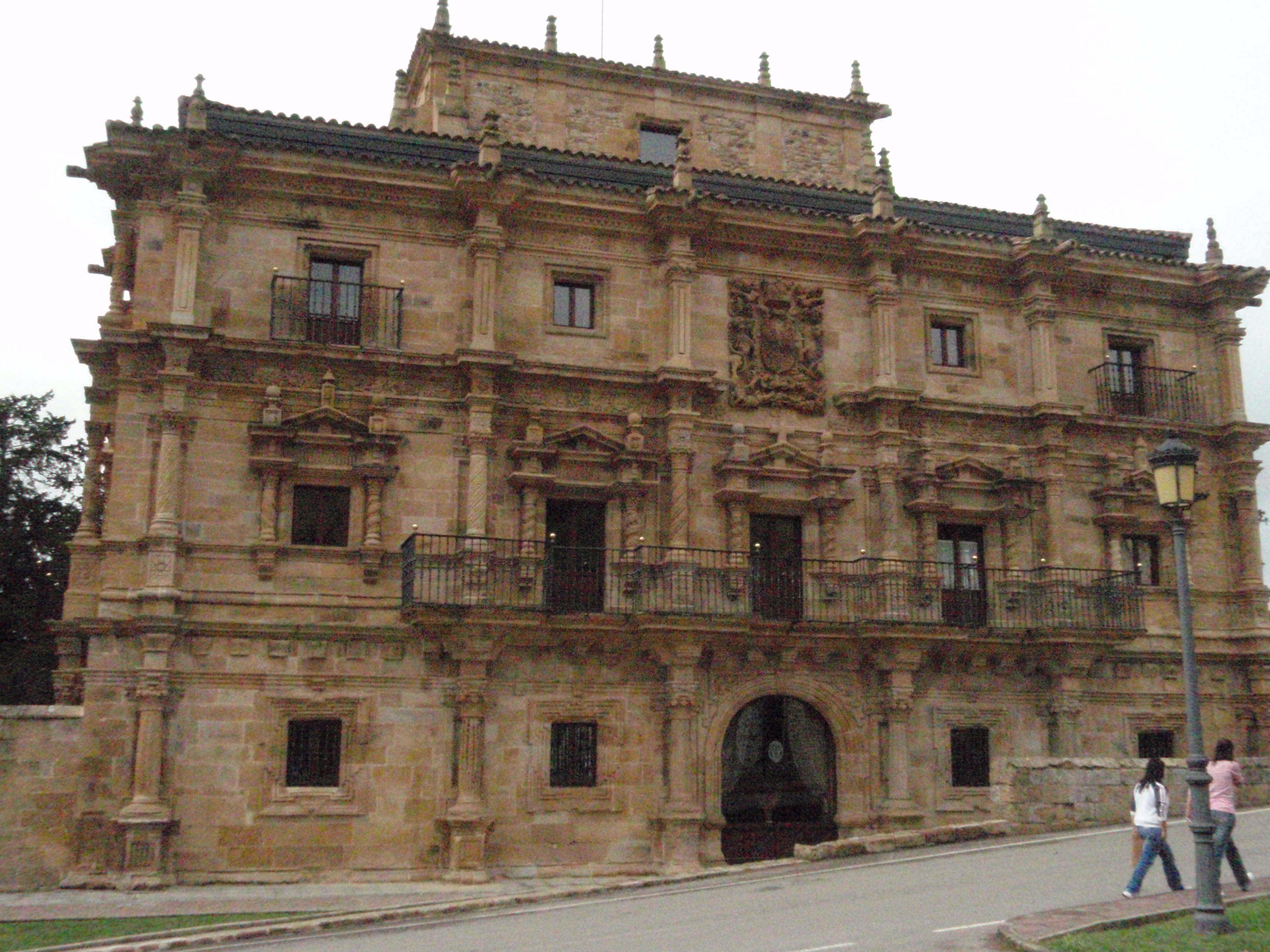 Palacio de Soñanes